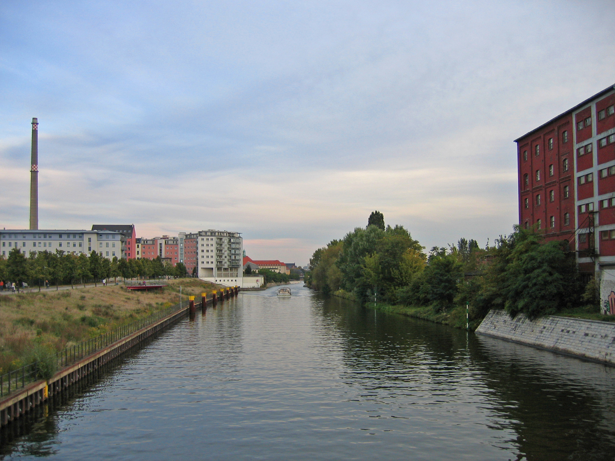 Berlin-Spandauer Schifffahrtskanal, Aussicht von der Kieler Brücke